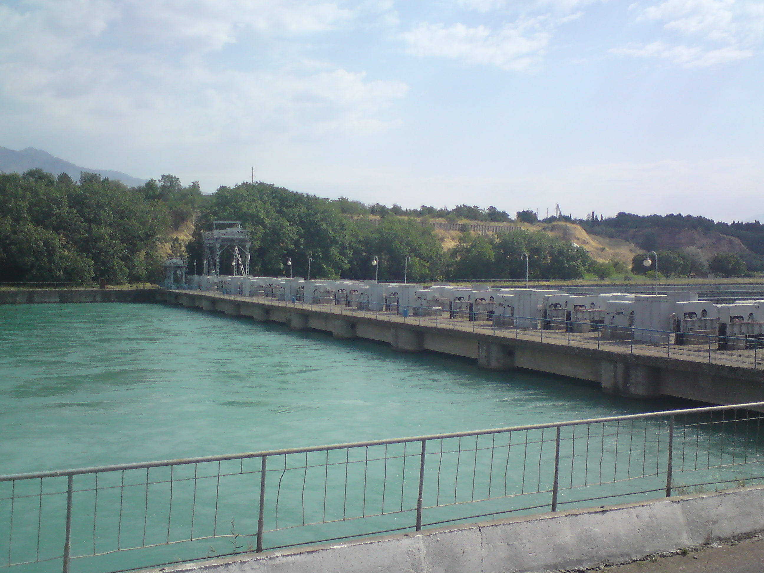 Начало Верхнего деривационного канал, отвода реки Чирчик, город Газалкент, Ташкентский вилоят